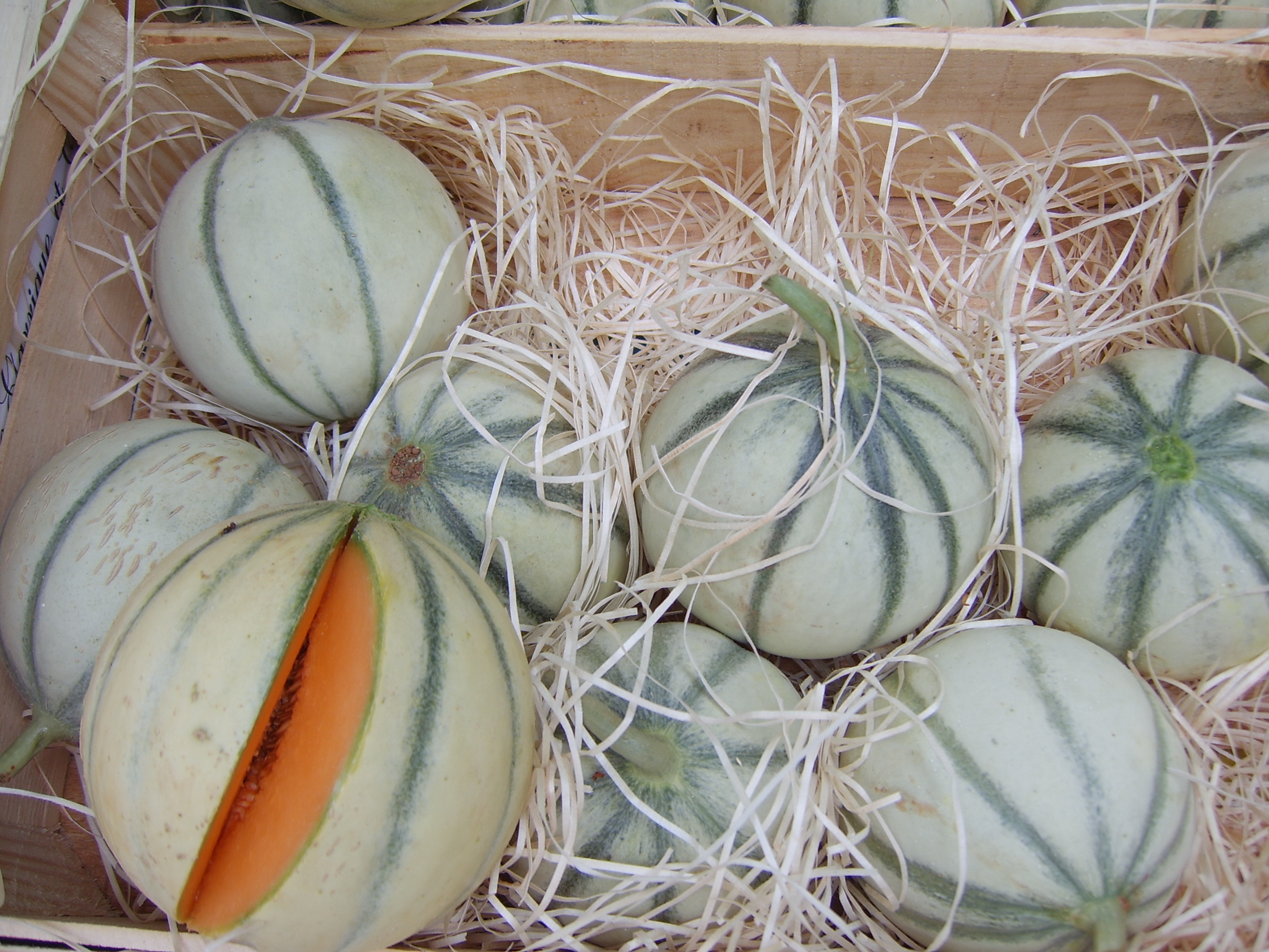 Eine Melonenart, hier auf einem Markt in Frankreich, 2006